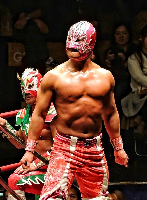 プロレスラーのめんたいキッド